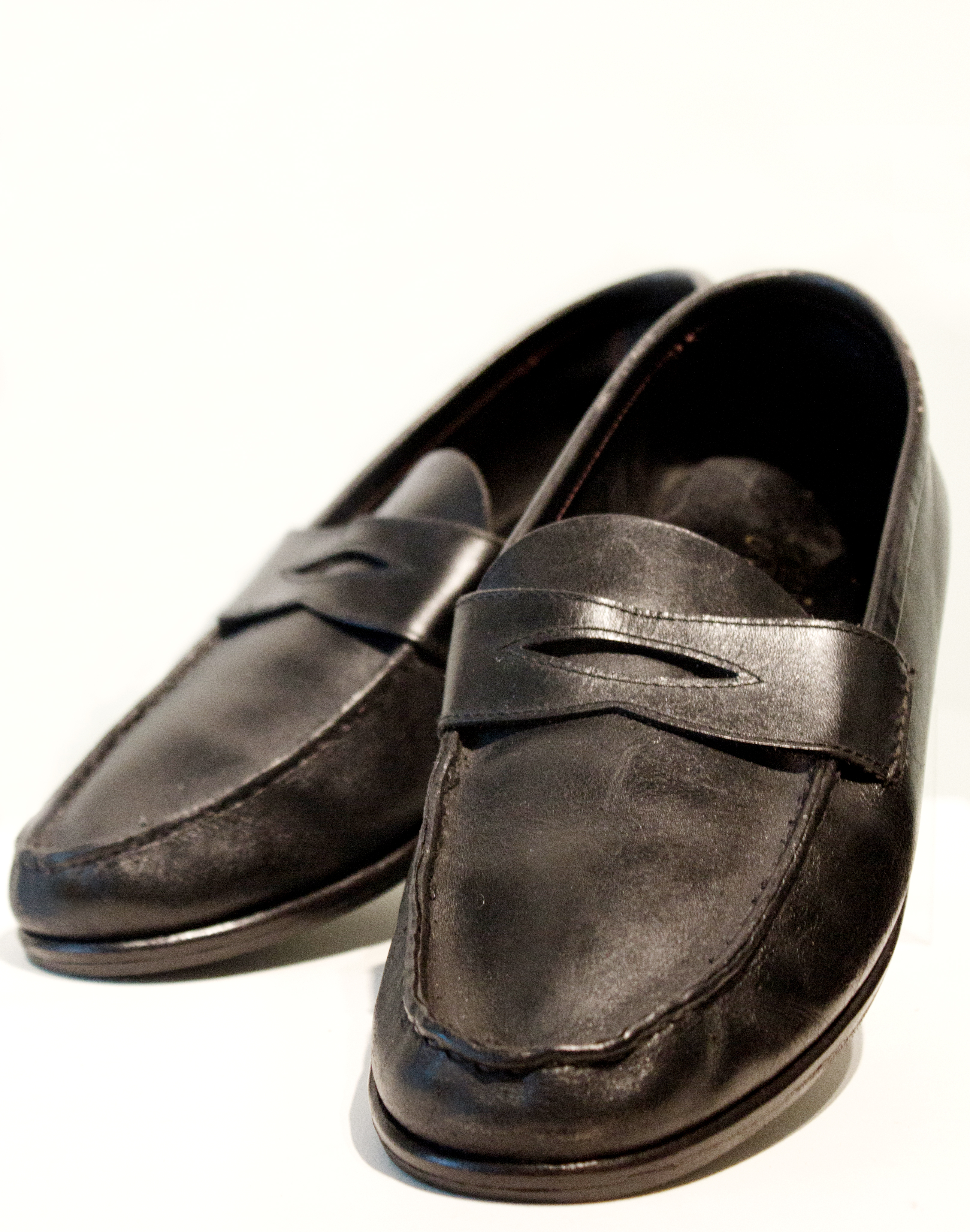 Mocasines pertenecientes al Presidente Néstor Kirchner.